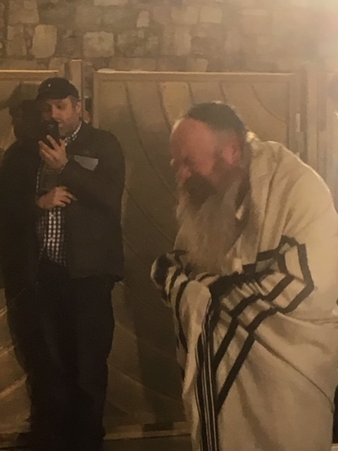 הרב יעקב עדס בתפילת ערבית בכותל המערבי